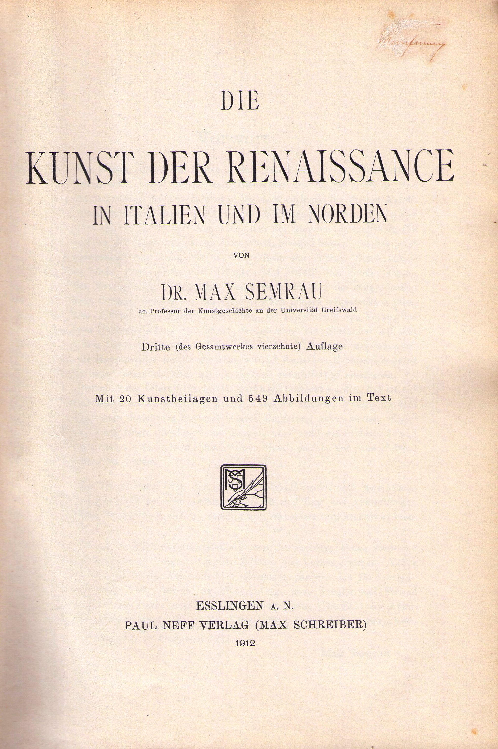 Titelblatt des 3. Bandes des Grundriss der Kunstgeschichte